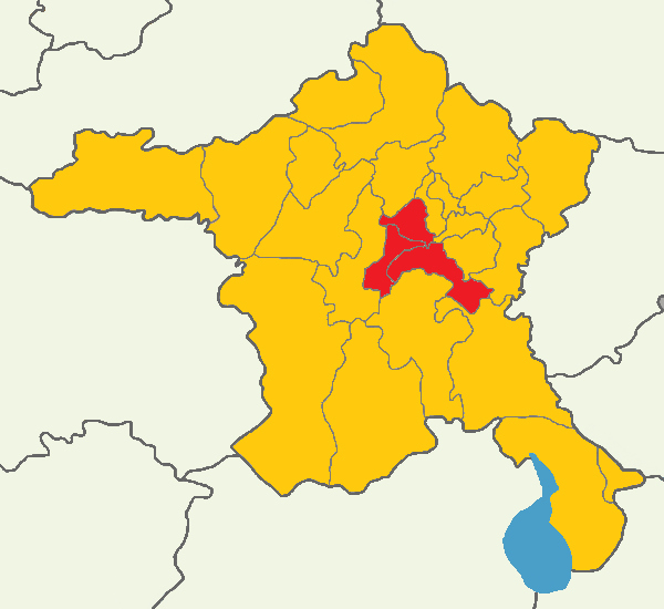 Ankara'da 2014 Türkiye cumhurbaşkanlığı seçimi